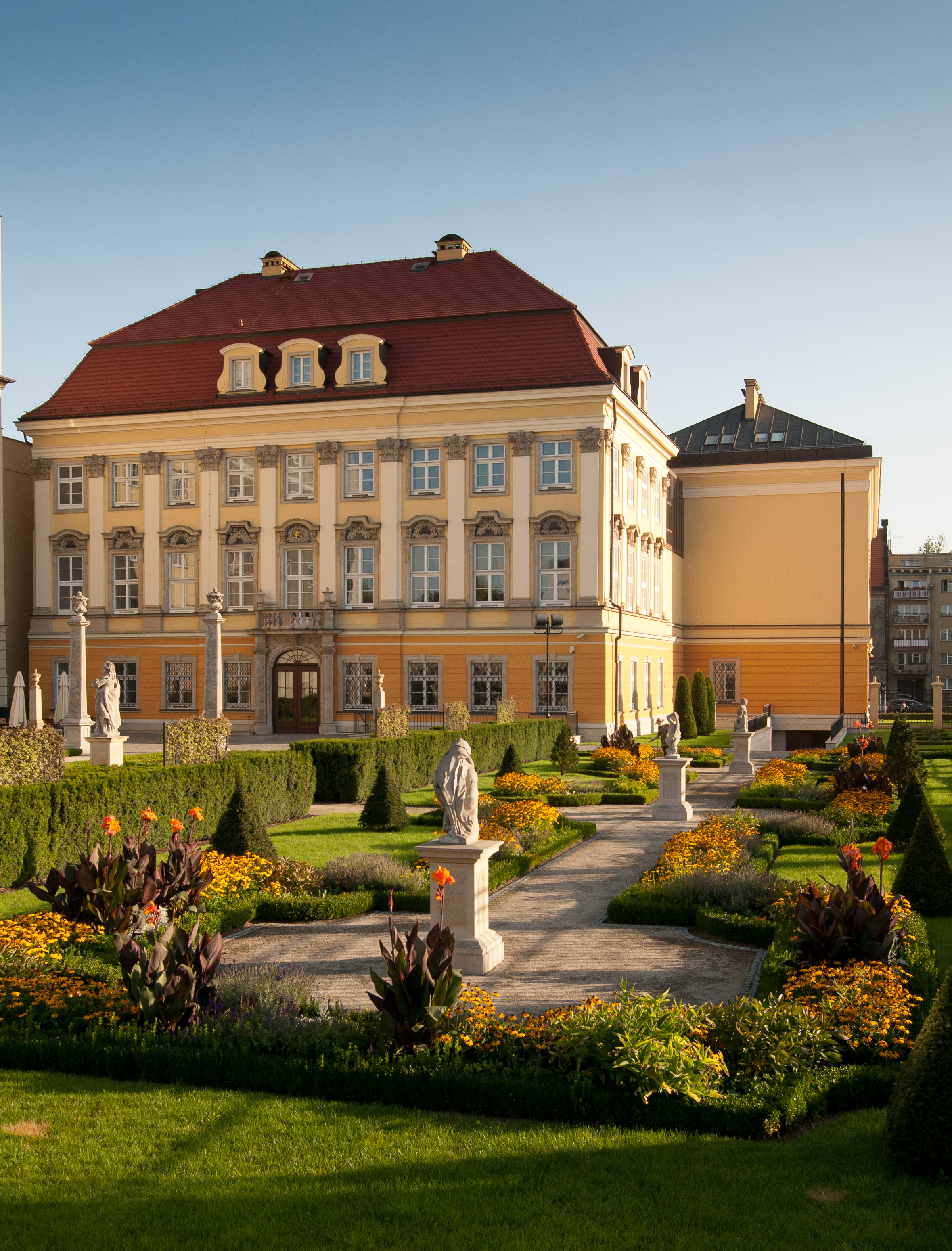 Ogród barokowy Pałacu Królewskiego we Wrocławiu